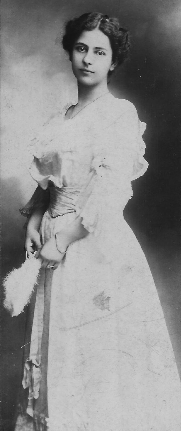 boldogfai dr. Farkas István (1875–1921) sümegi főszolgabíró második felesége, pósfai Horváth Johanna (1883–1919)